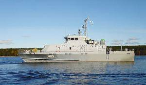 Противодиверсионный катер